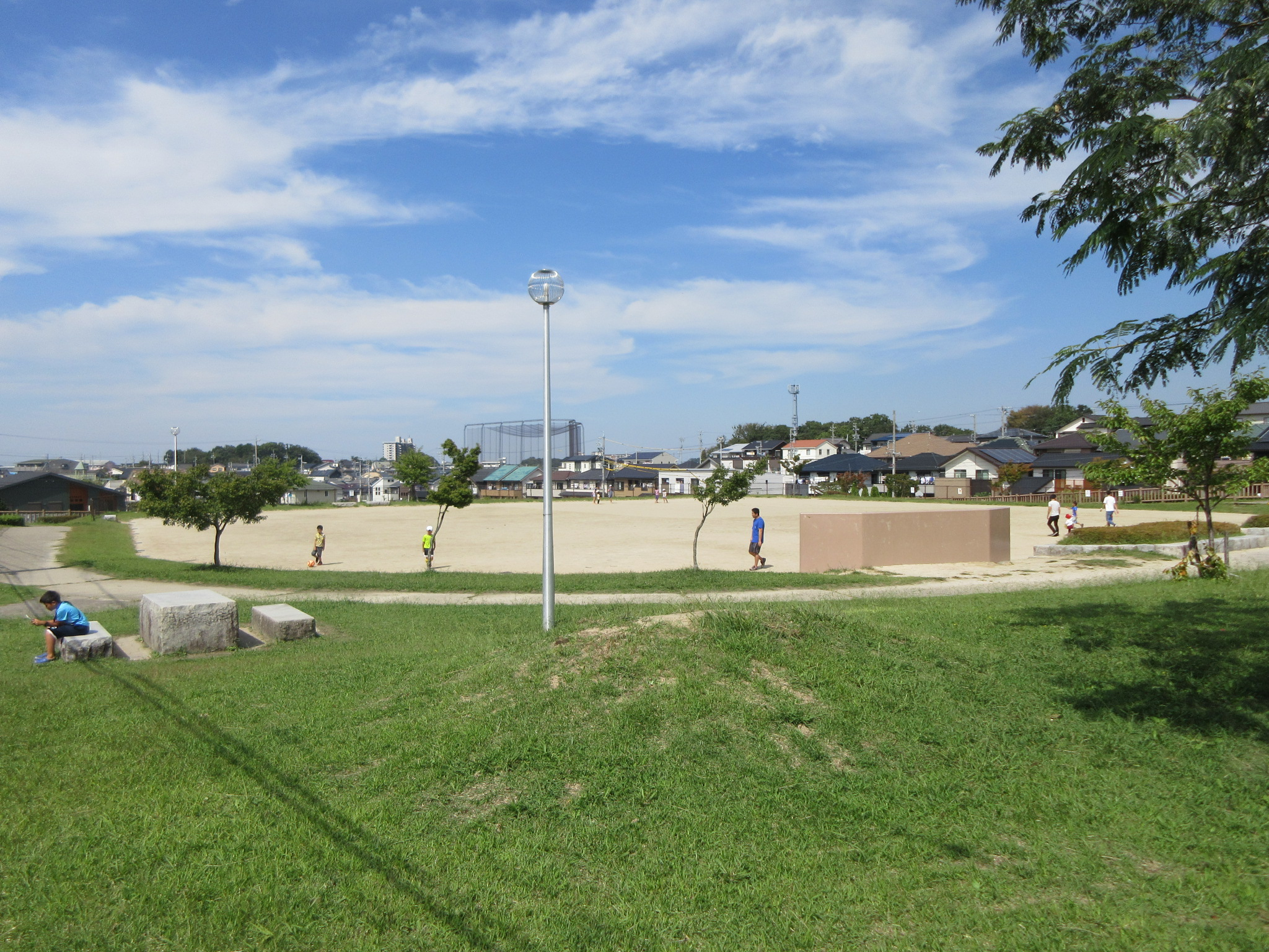 吉祥中央公園（岡崎市真伝町）